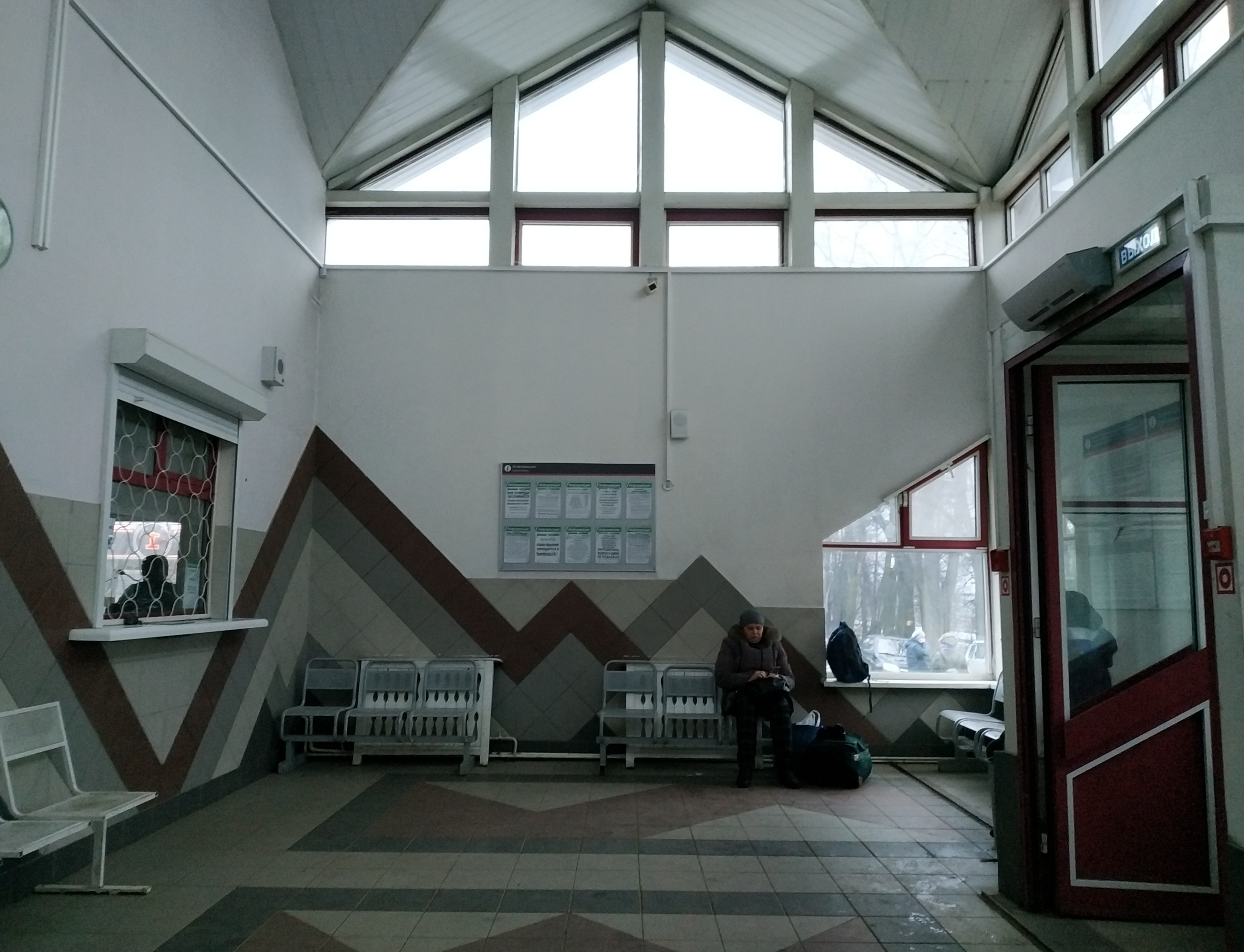 Платформа Турист РЖД